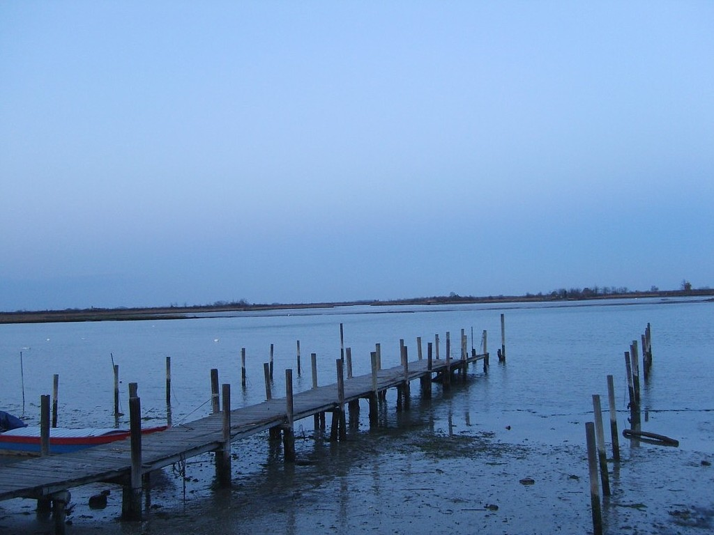 Immagine amatoriale della laguna di Caorle realizzata il 17 febbraio 2007